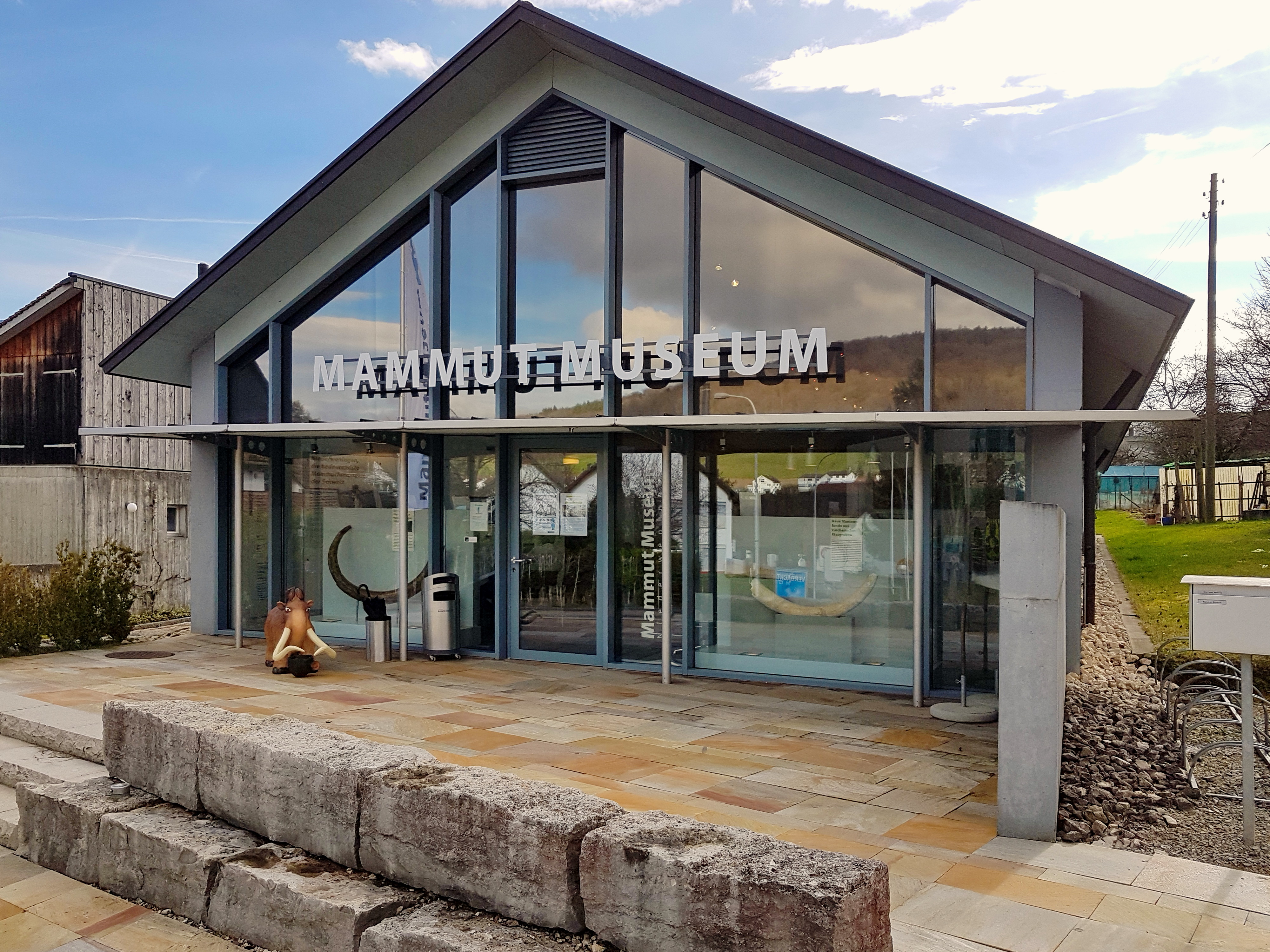 Mammutmusem in Niederweningen (Switzerland)